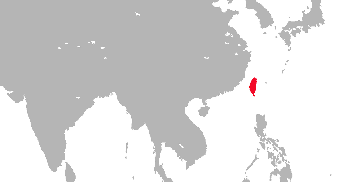 Carte de répartition du macaque de Formose, Macaca cyclopis. Etablie par Christophe Chauvin.